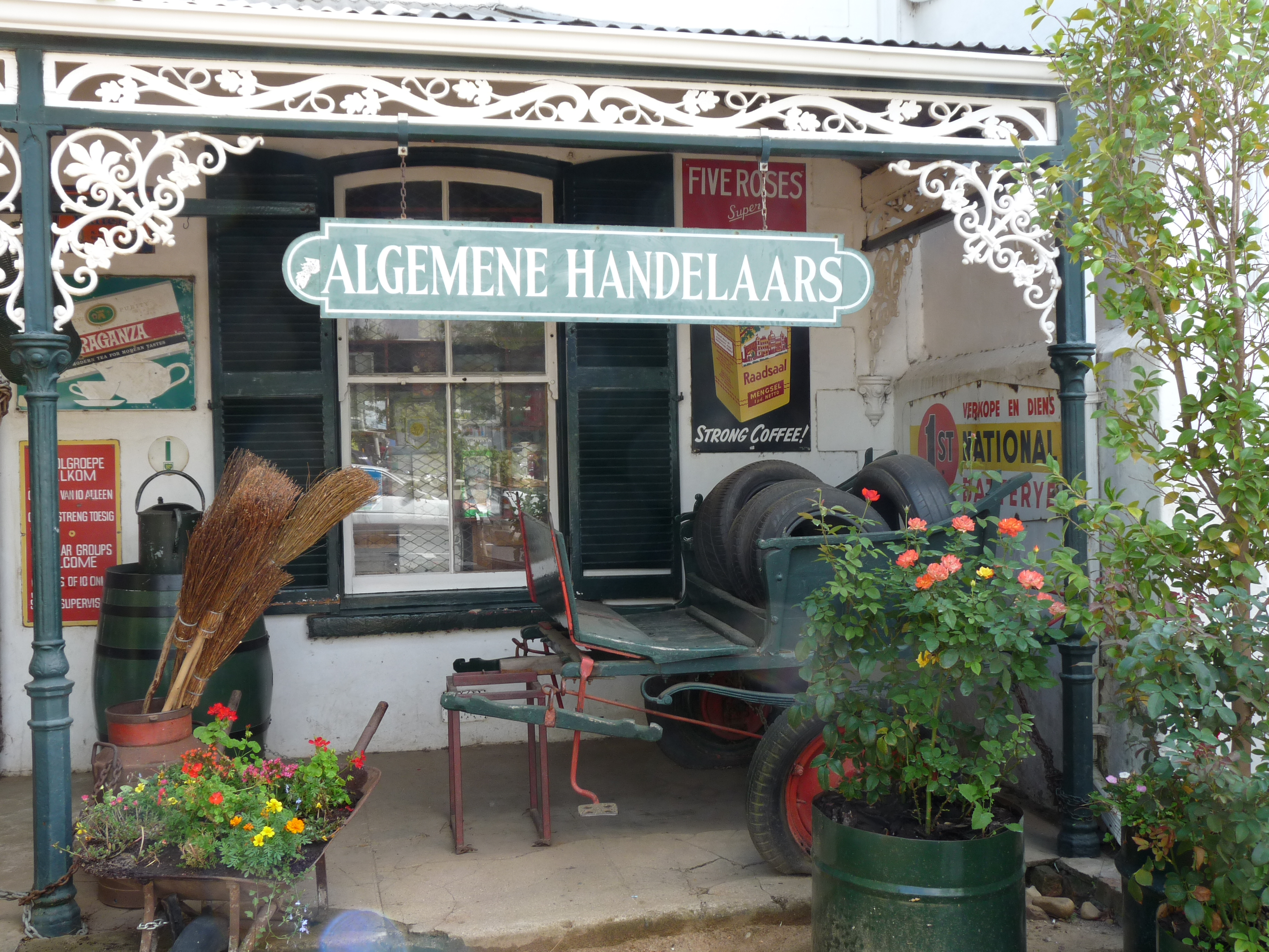 Oom Samie se winkel 02